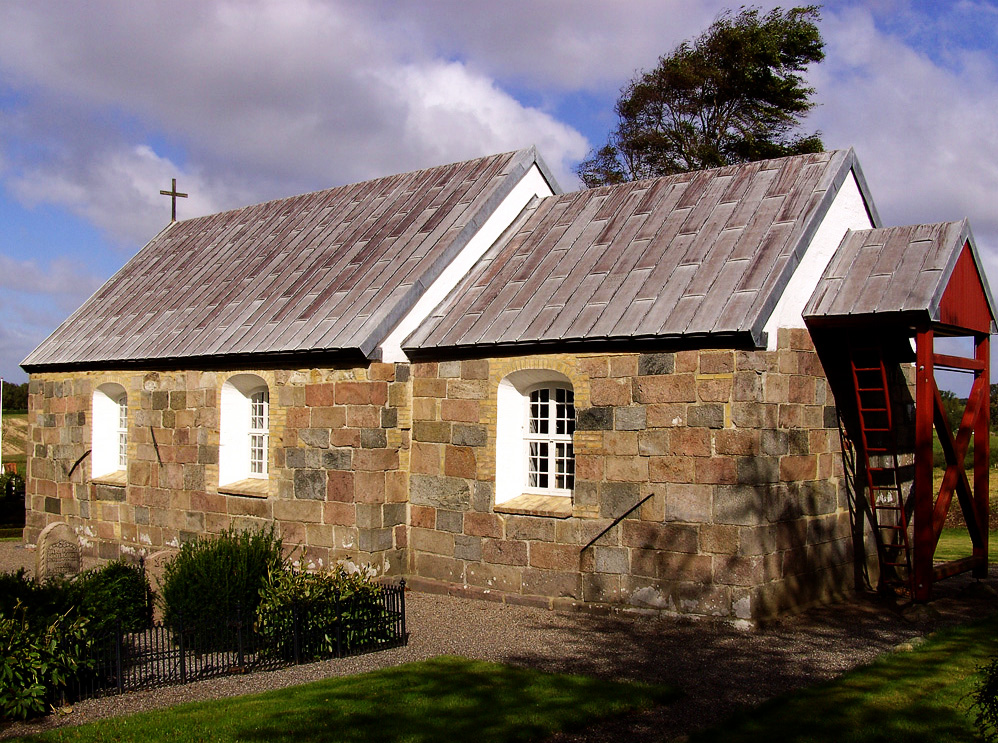 fra sydøst